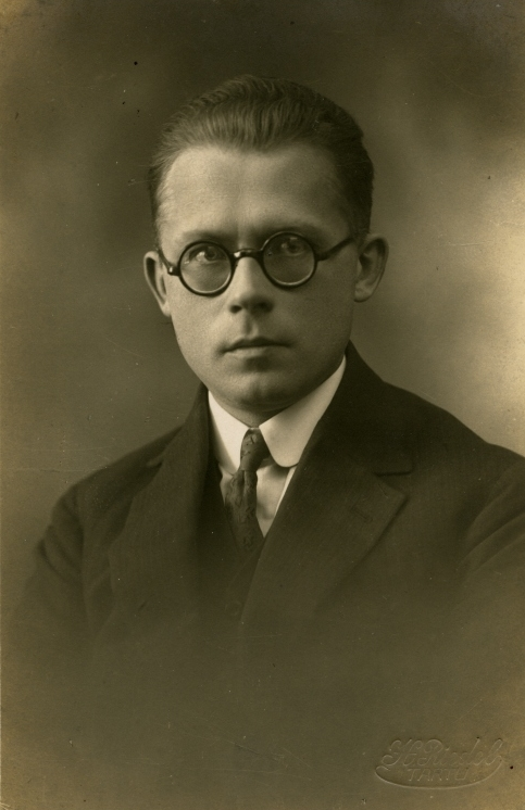 Andrus Saareste, eesti keeleteadlane